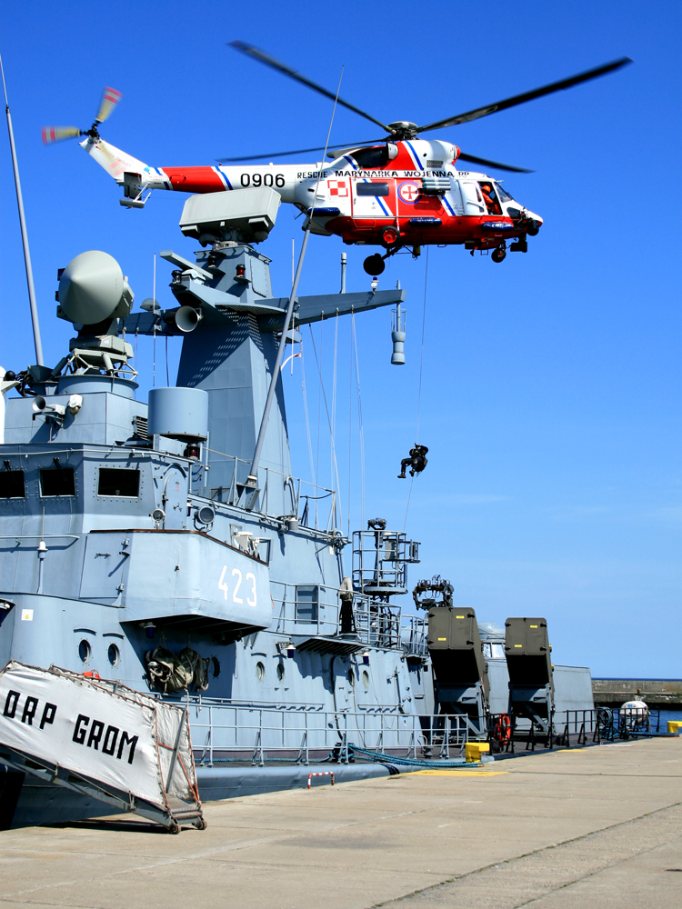 Komandosi Gdynia 2008